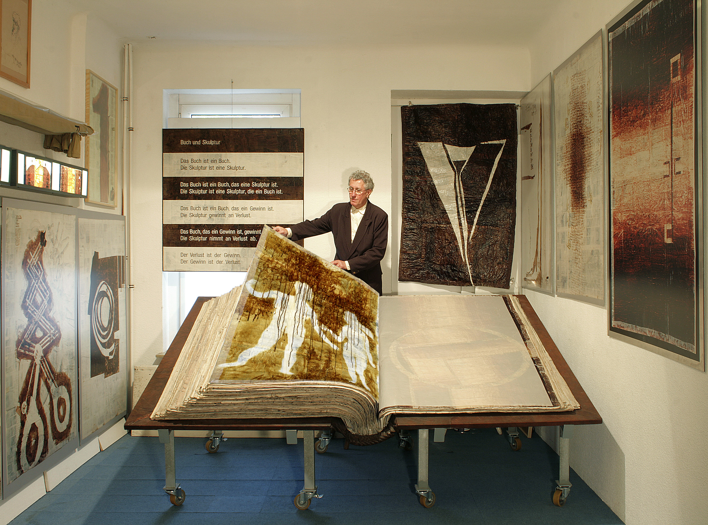 2009 - Foto für die Erstveröffentlichung freigegeben, Fotografie von Rosa Westhaus